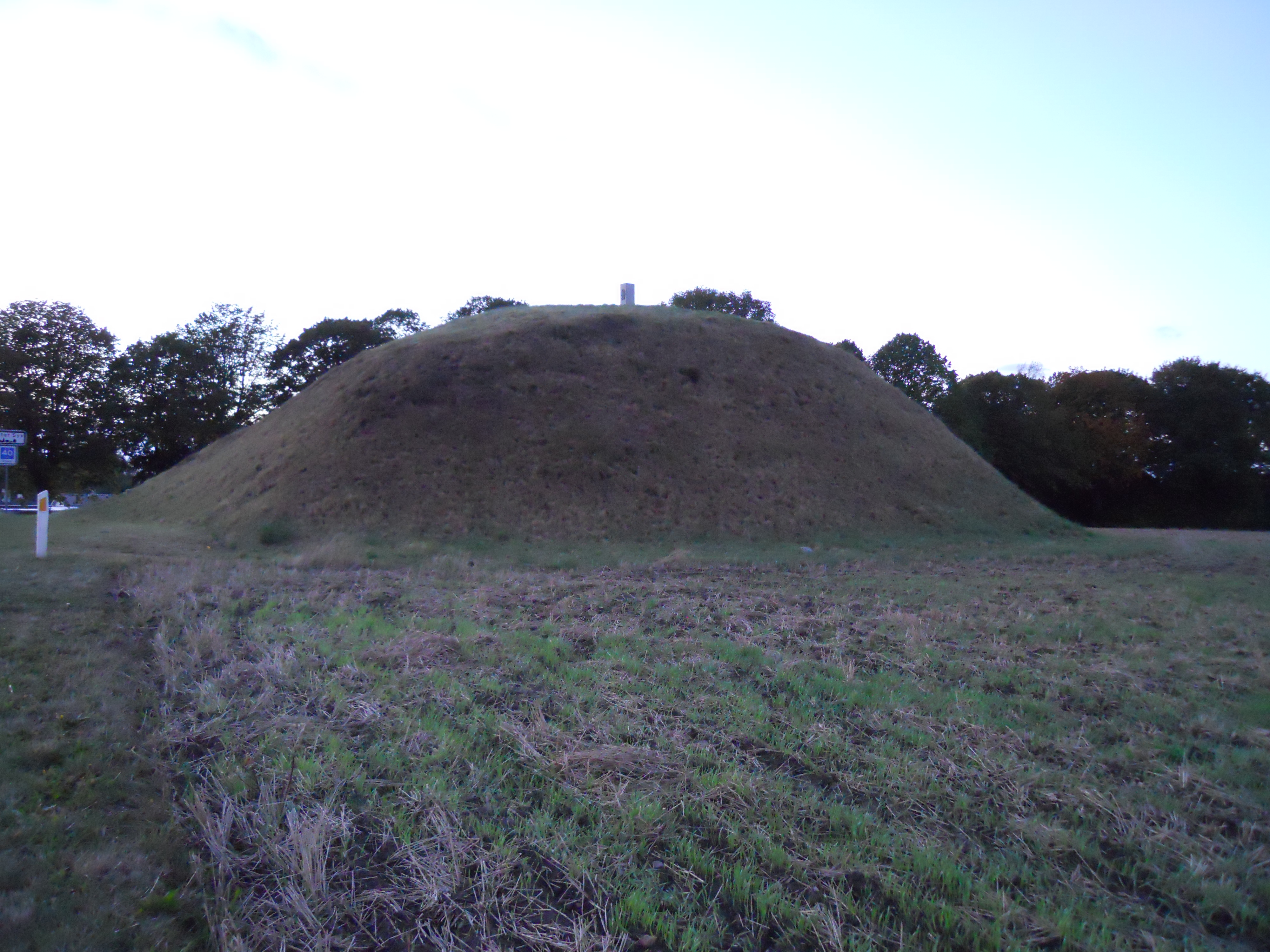 Bavnehøi - rundhøj ved Kirke Syv